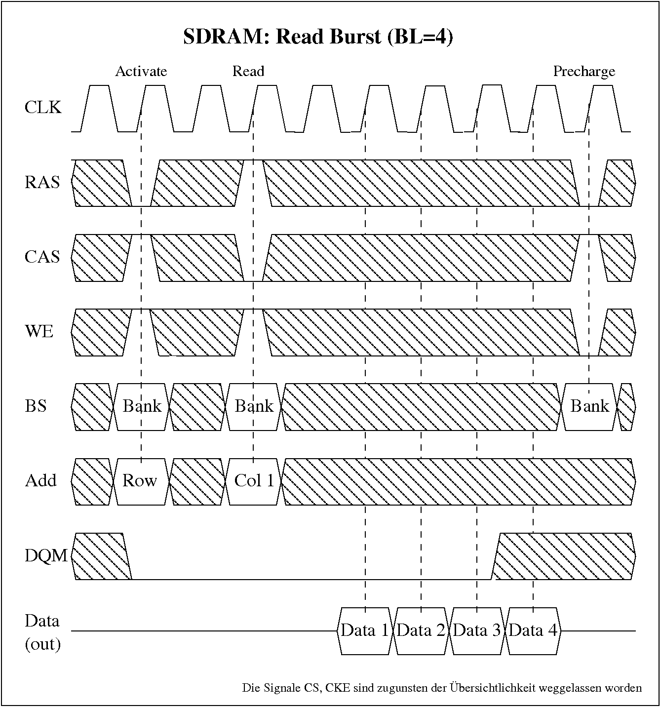 Darstellung eines 'Burst-Read'-Lesezugriffes eines SDRAMs